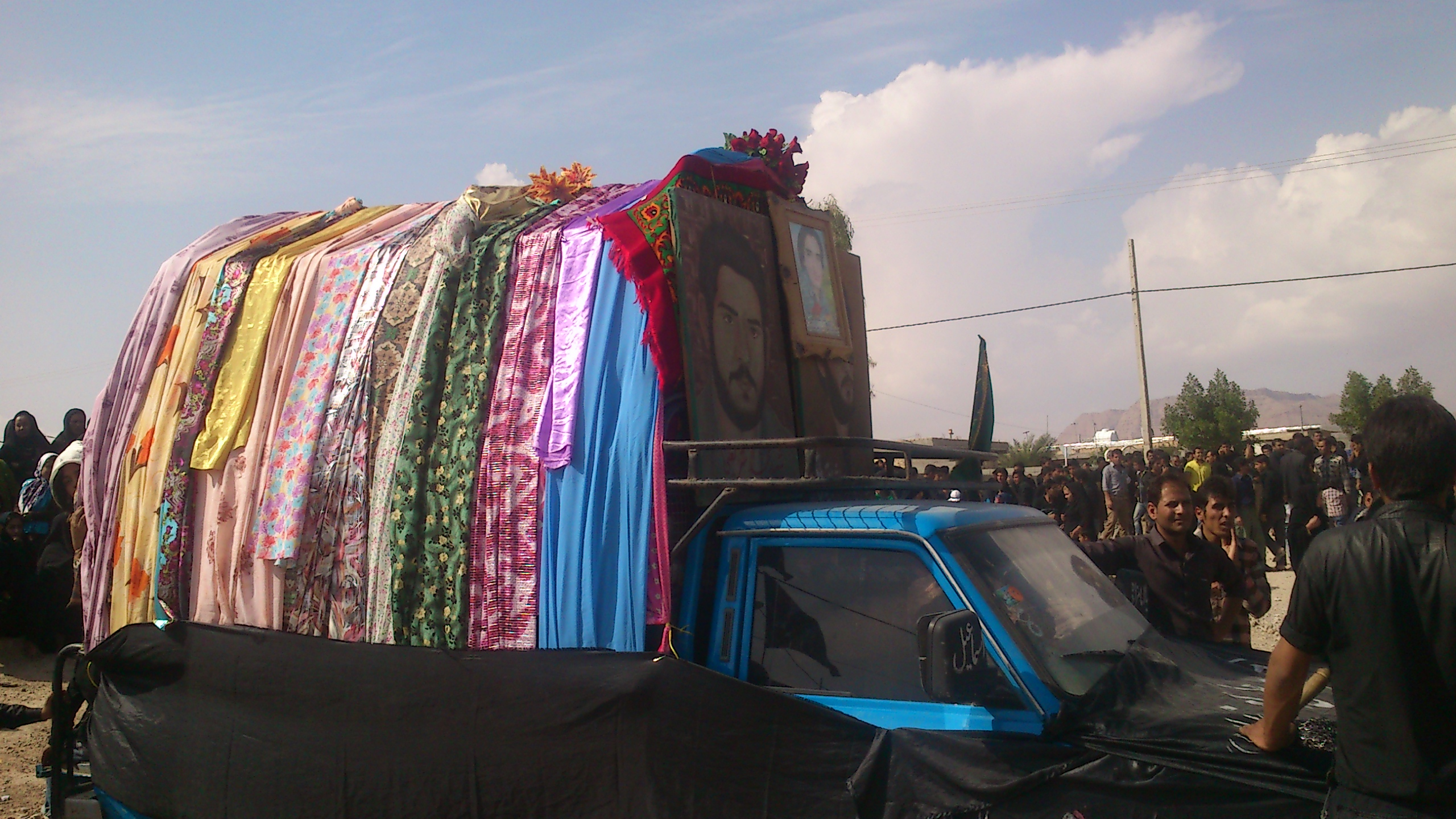 کتل نماد حجله قاسم بن حسن در مراسم روز عاشور در دبیران